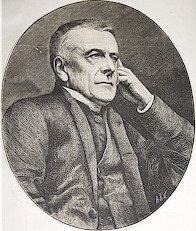 Frederick Oakeley (Shrewsbury, 5 septembre 1802 – Islington, 30 janvier 1880)